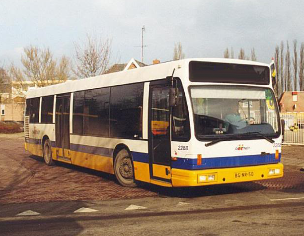 Oostnet 2268 Alliance